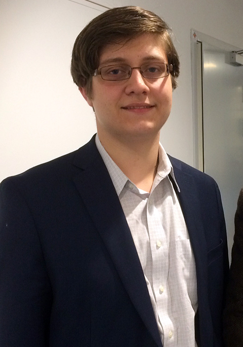 Sam Sevian och Nils Grandelius efter Schackduellen i Expressen TV 5 januari 2016